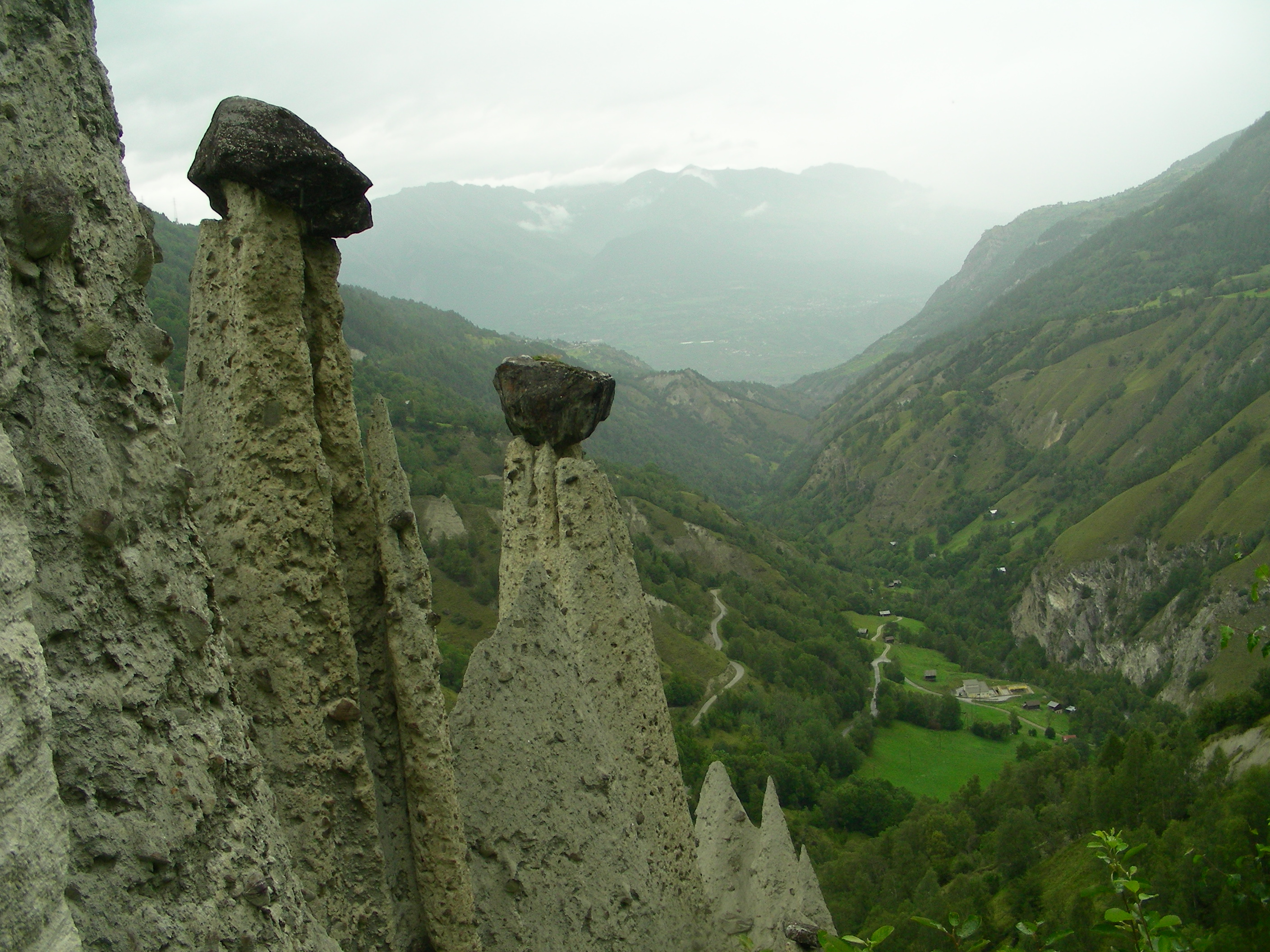 Natural pyramids in Euseigne (Valais, CH)